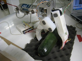 garra